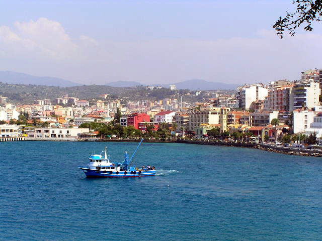 поглед на део центра града; Кушадаси / Ајдин, Турска